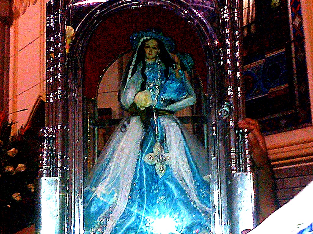 Viste de la imagen de la Virgen de El Cisne en Santo Domingo - Ecuador.